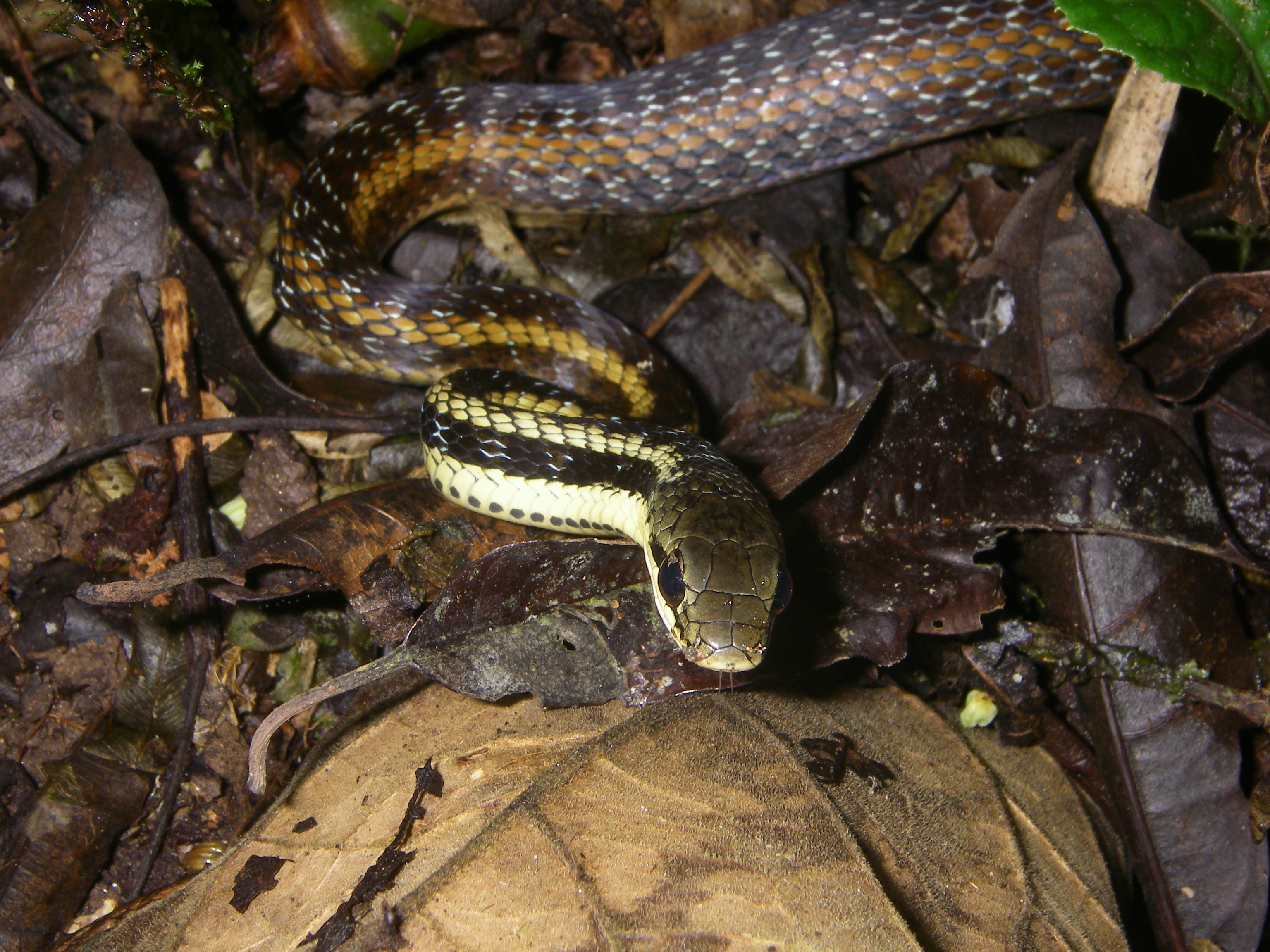 Bibilava epistibes; Sakaroa, Ranomafana National Park, Madagascar